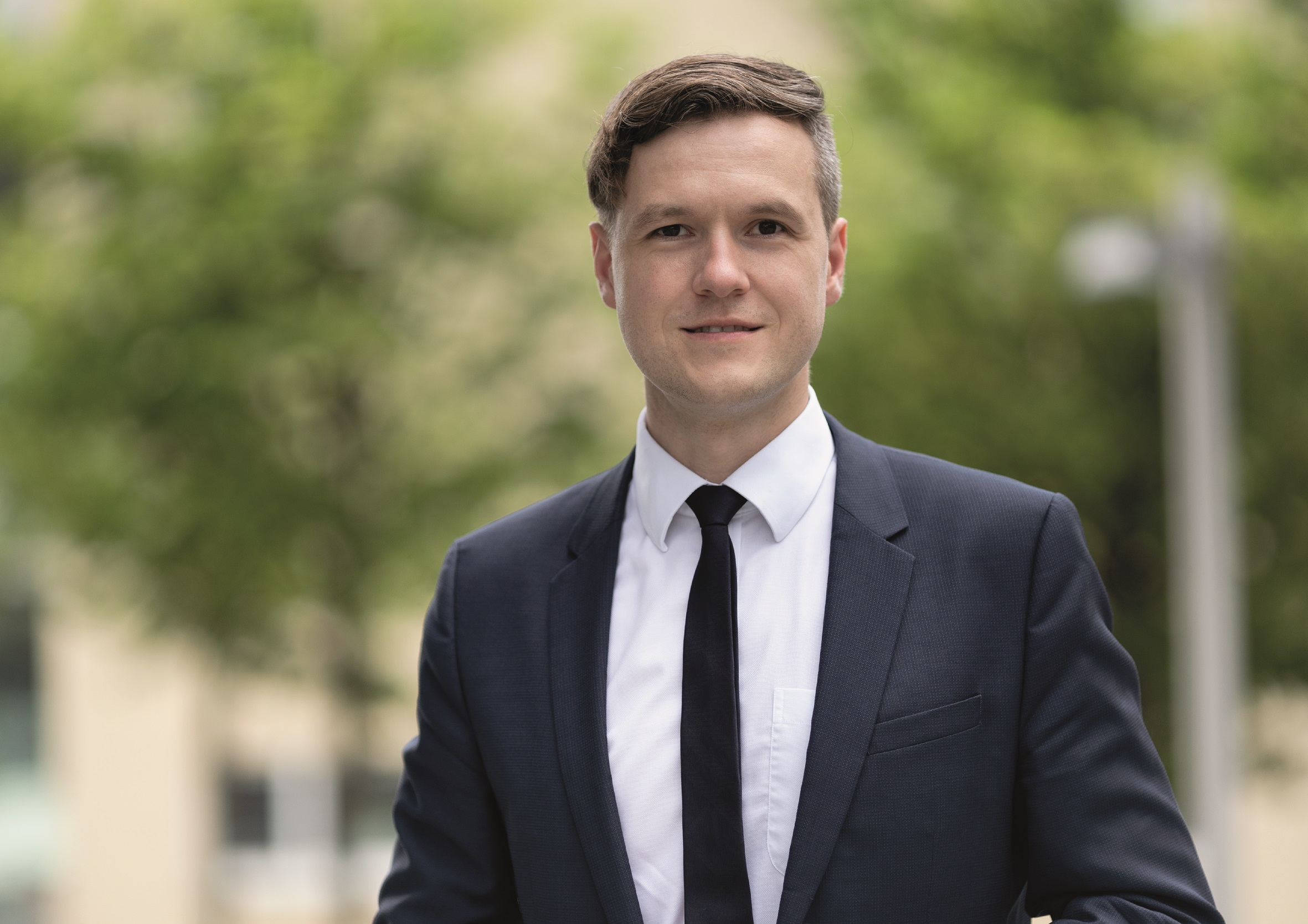 Jan Löffler - Mitglied des Sächsischen Landtages - CDU Fraktion